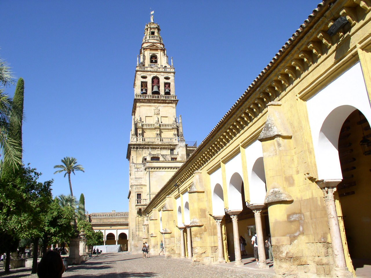 Córdoba (España).